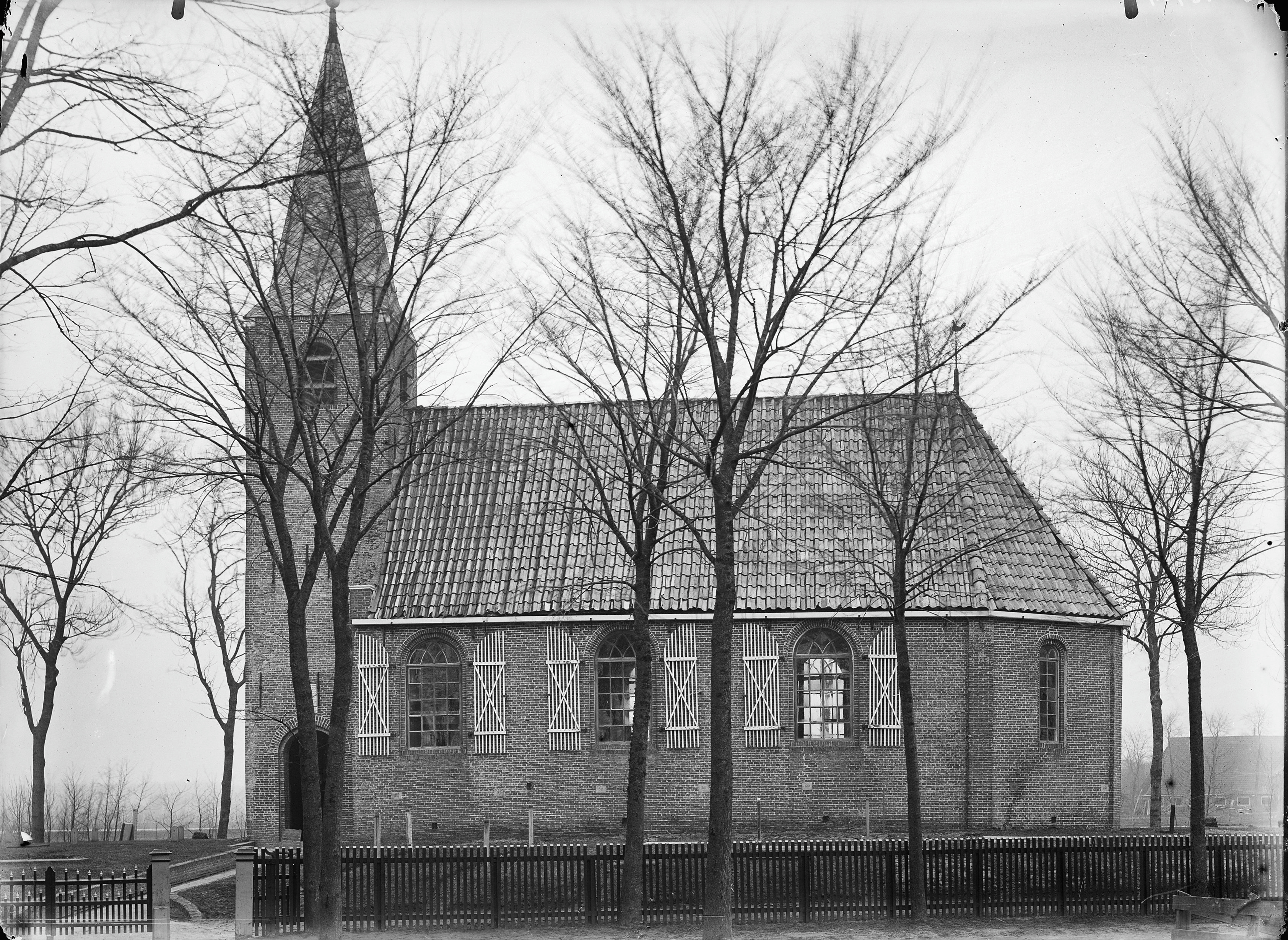 Nederlands Hervormde Kerk: kerk vanuit het zuiden